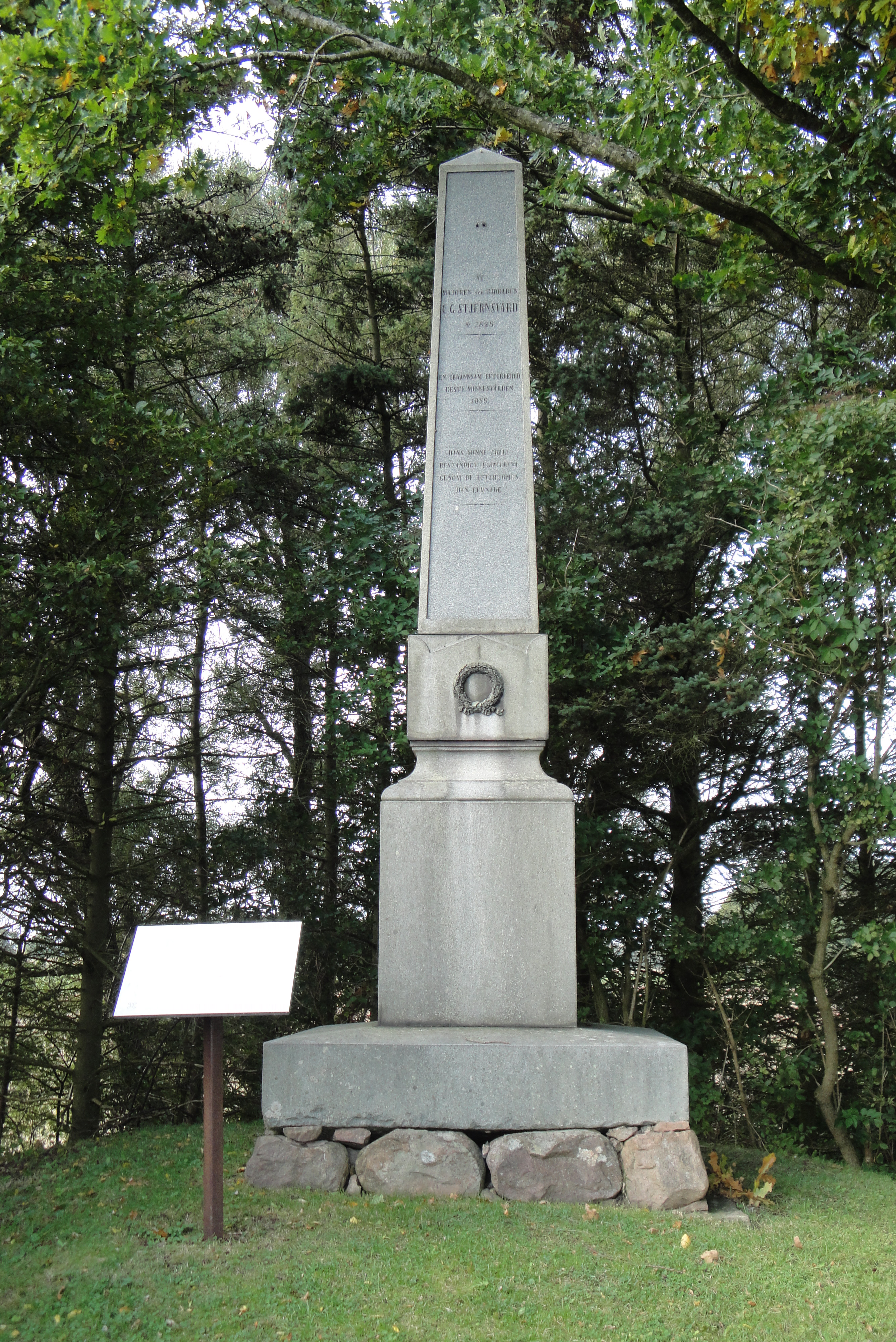 Hjärnarp 78:1